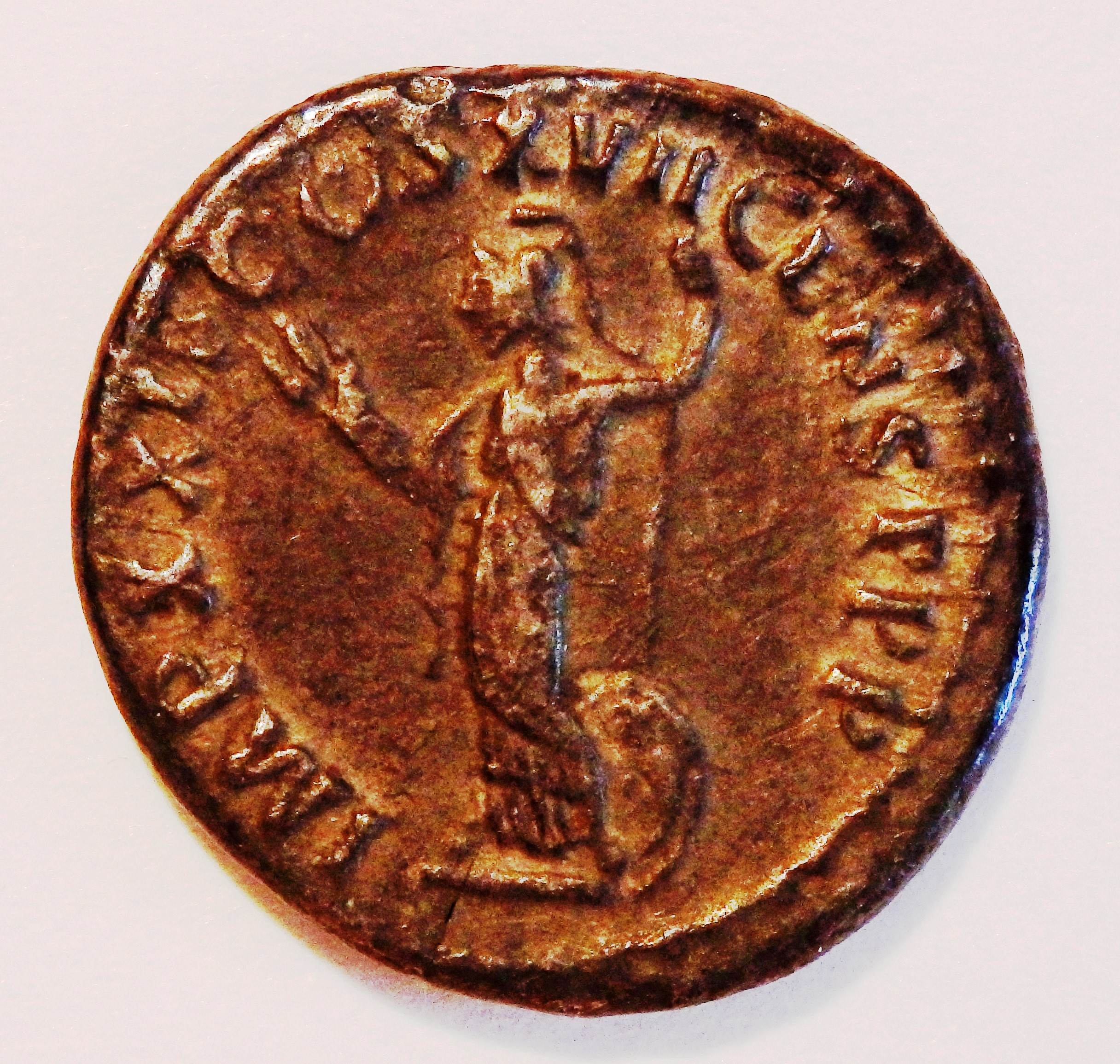 Minerva auf Denar des Domitianus, Kampmann 24.83